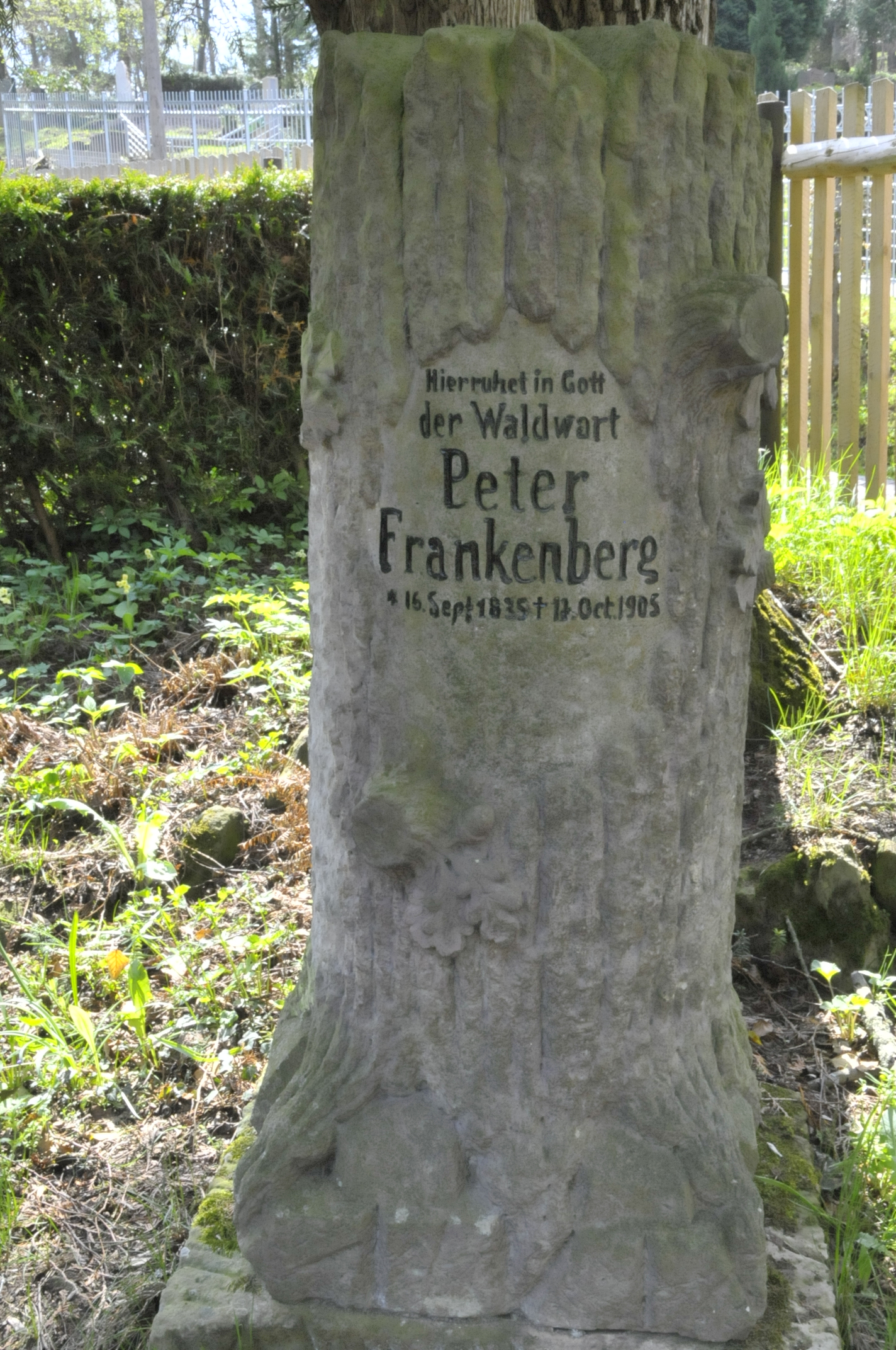 Grabstein des Waldwartes Frankenberg in Elgersburg